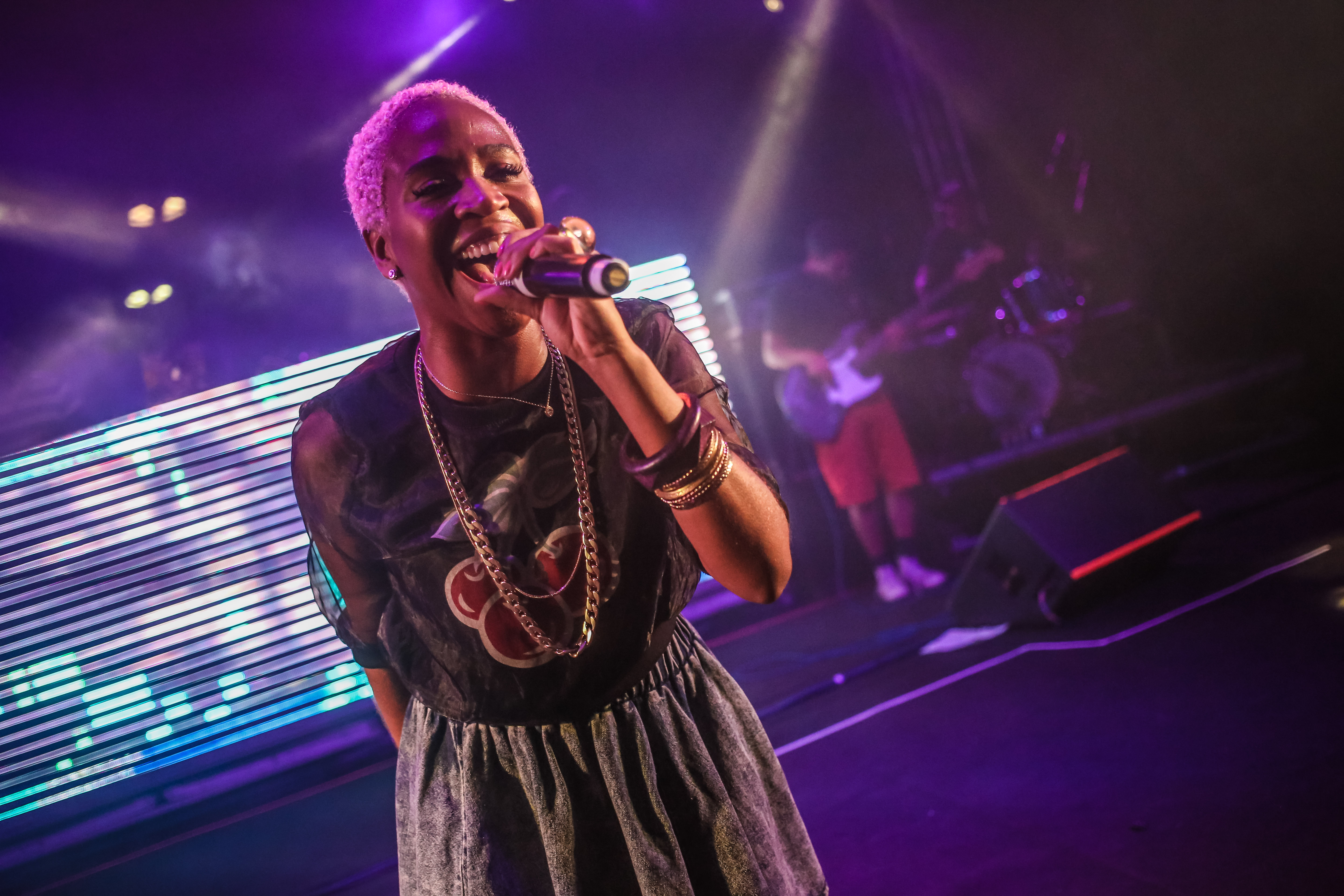 Festival SP RAP • ProjetoNave e Convidados